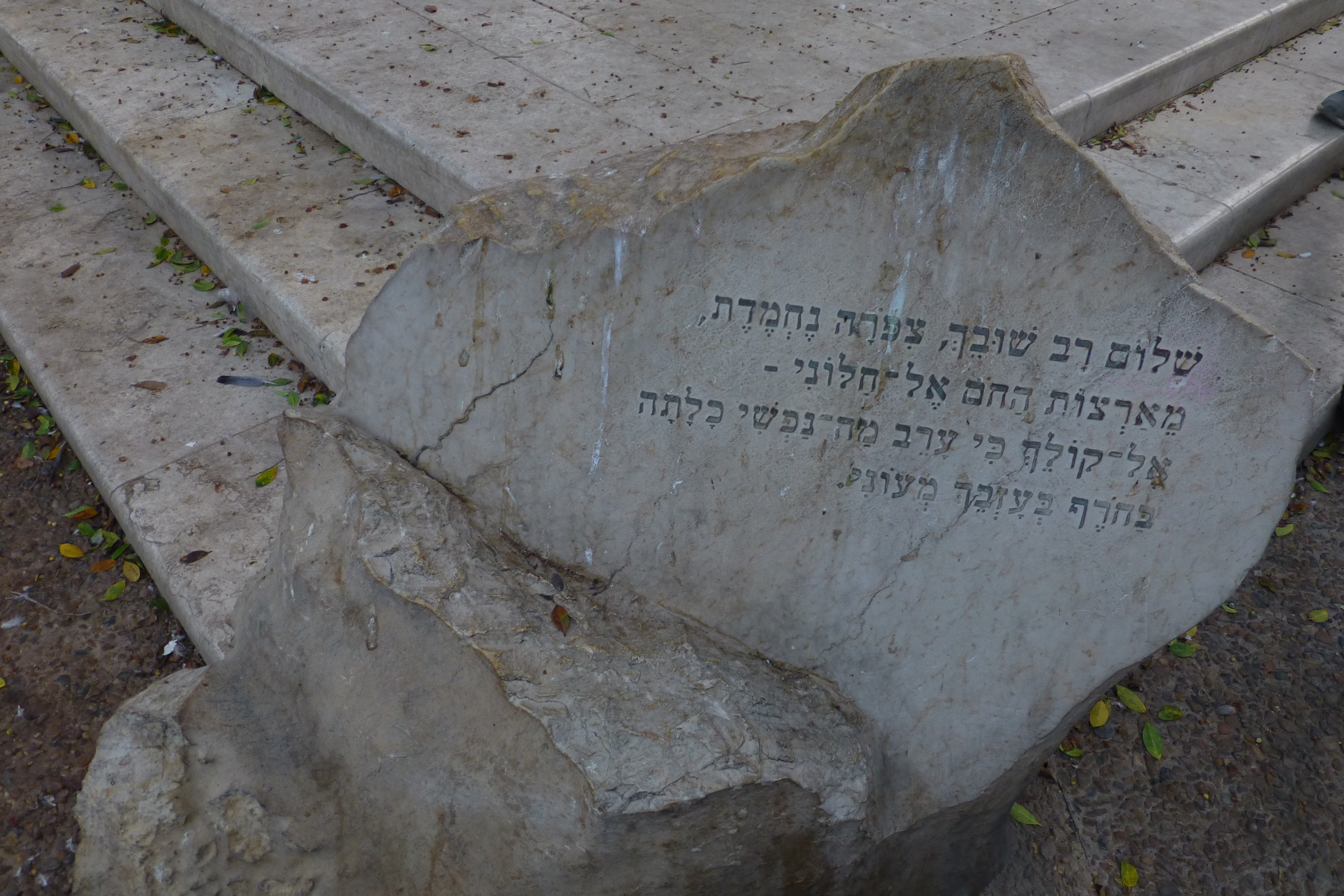 קולנוע אורדע - מבנה בסגנון הבינלאומי בו נפתח בית הקולנוע הראשון ברמת גן. בנייתו החלה ב-1936 ובאפריל 1937 פתח את שעריו. תכולתו עמדה על כ-800 מושבים ונערכו בו גם מופעים. ב-1990 חדל לשמש כבית קולנוע וכיום שוכן במבנה סניף של סופרפארם.